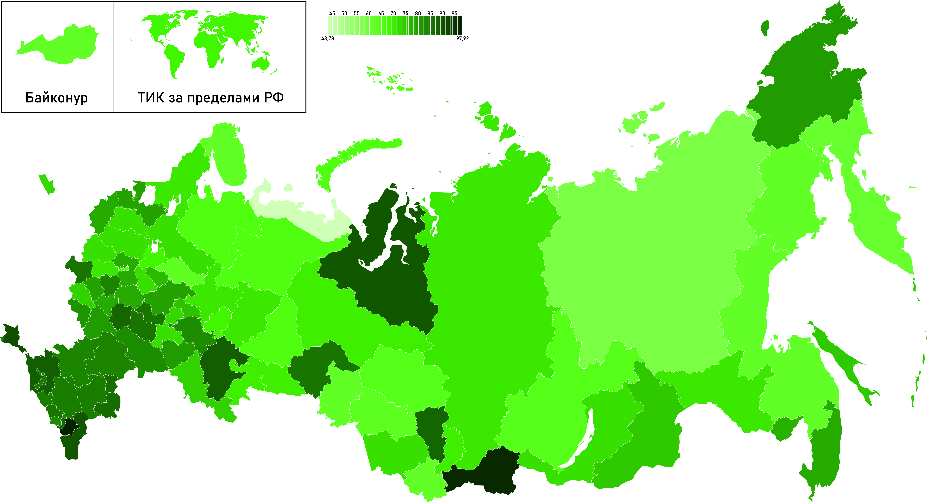 Карта результатов «Да» по субъектам федерации